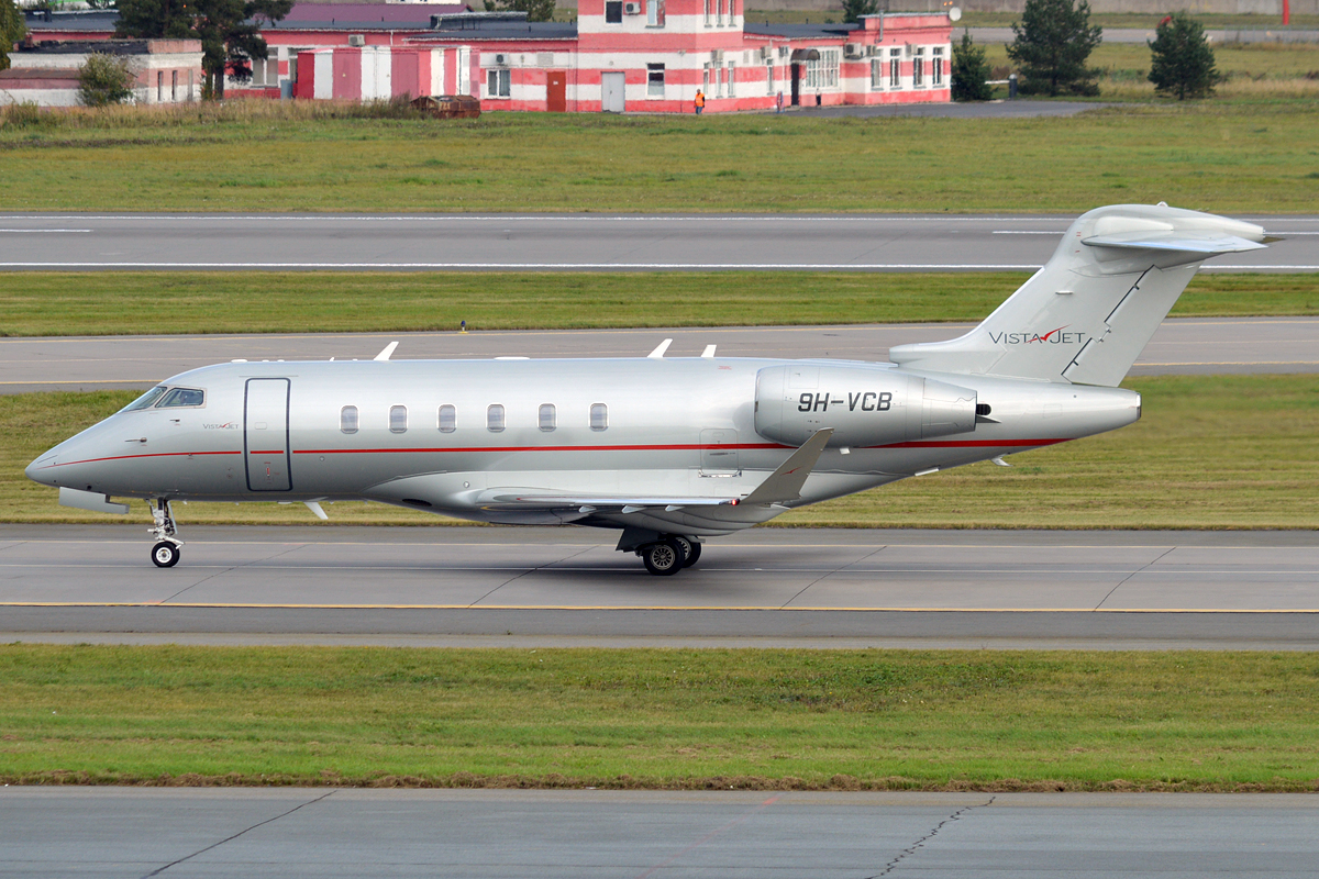 VistaJet, 9H-VCB, Bombardier Challenger 300